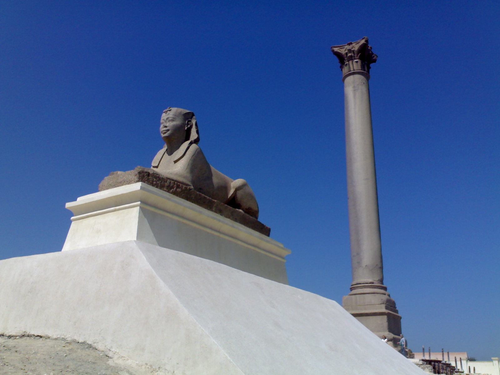 عمود السواري وتمثال من الرجانيت بمنطقة عمود السواري الأثرية بالإسكندرية.